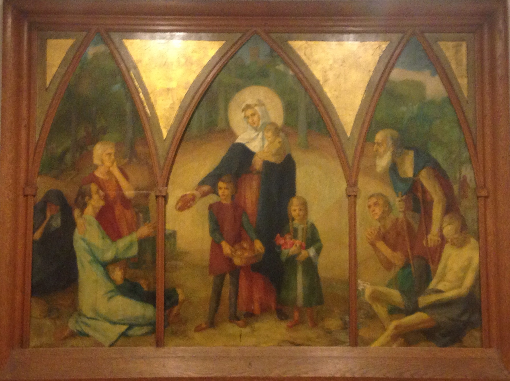 Ölgemälde der Hl. Elisabeth von 1932. Sie verteilt das Brot an die Armen